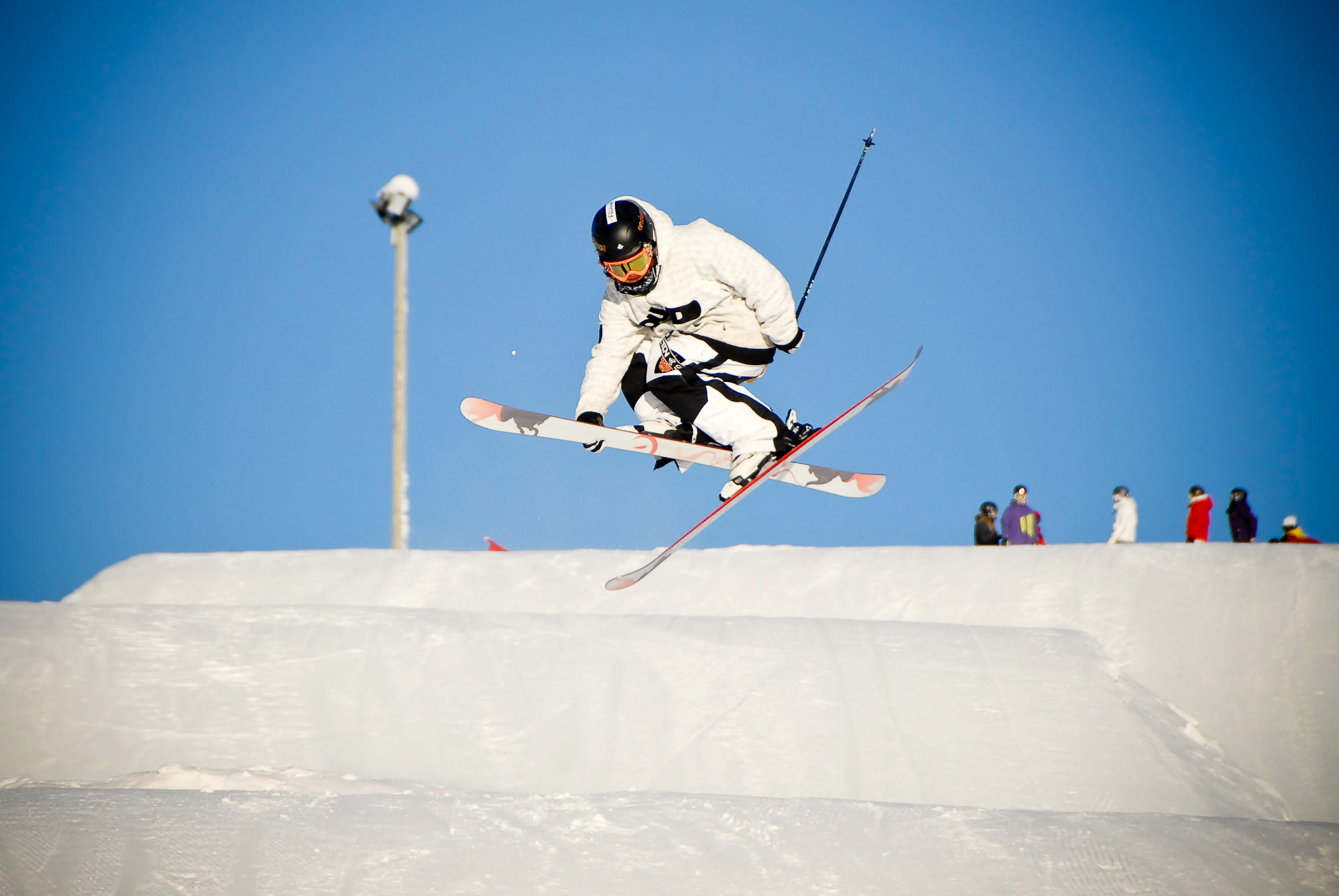 Freeskiing in Trysil. Rider: Anders Nordermoen. Photo: Ola Matsson